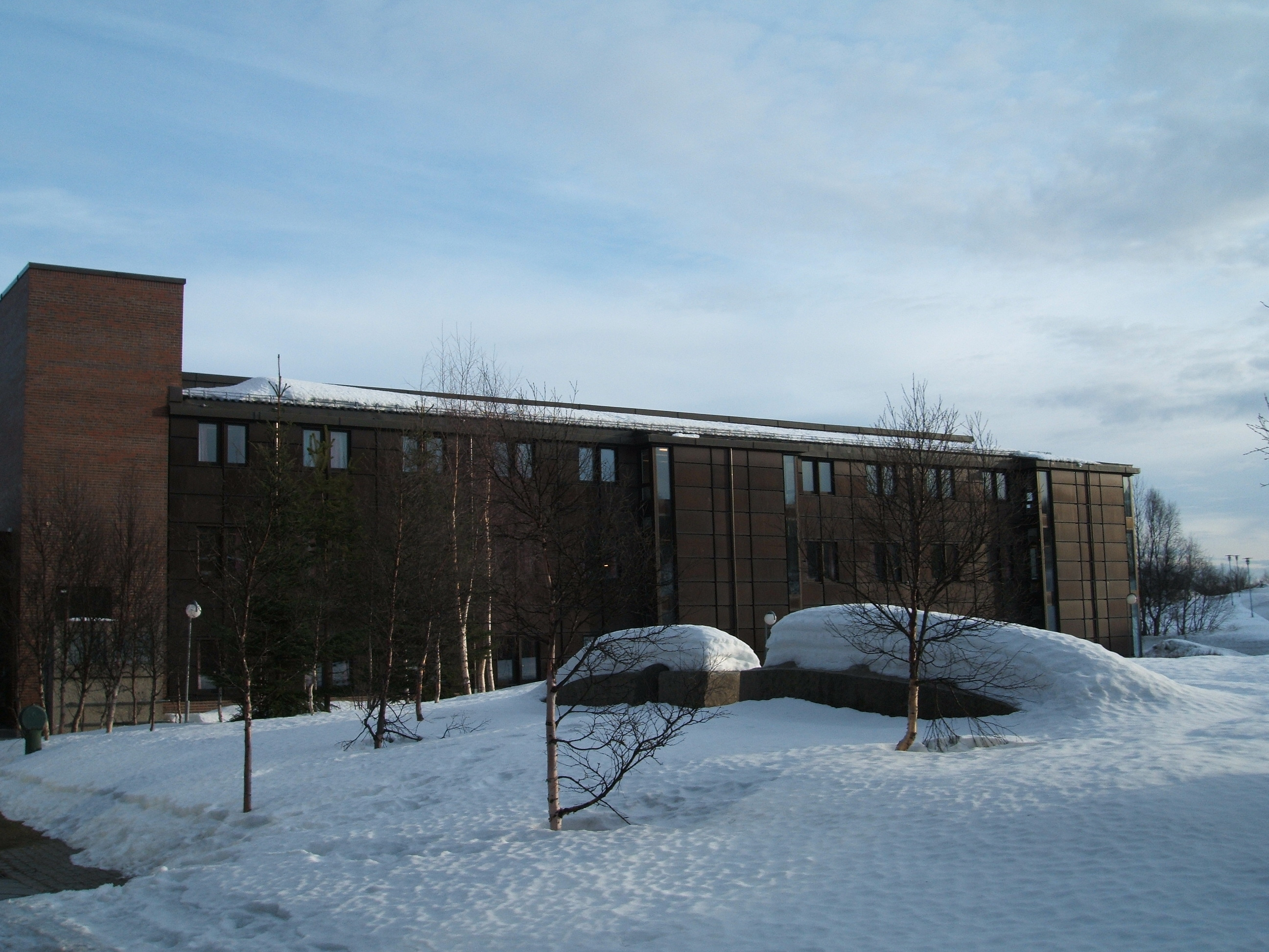 Humanistisk fakultet, Universitetet i Tromsø